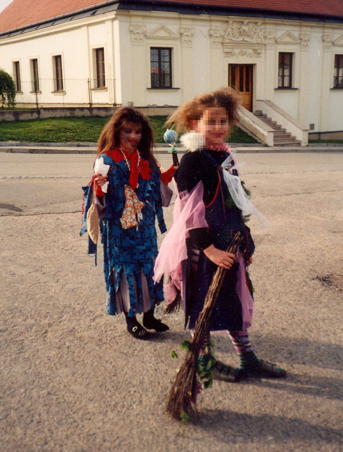 Photo personnelle prise en Tchéquie (Valdice) le 30 avril 1998. No copyright